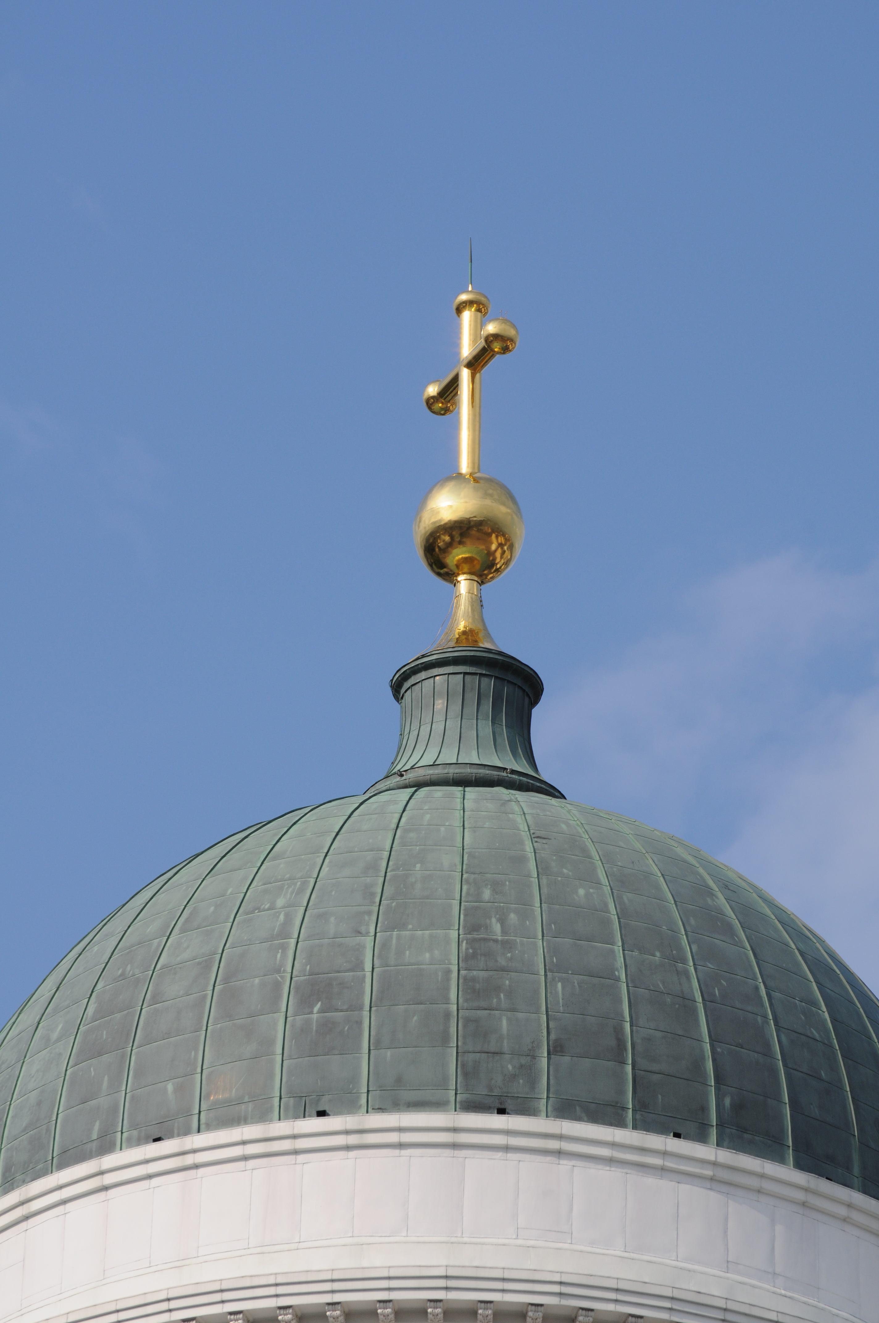 Zentrale Kuppel des Doms von Helsinki